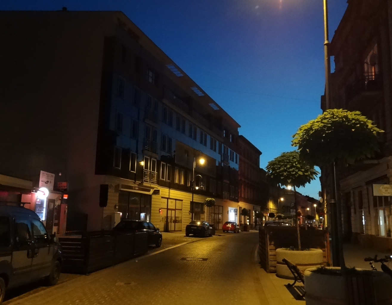 Ulica Dworcowa w Bydgoszczy